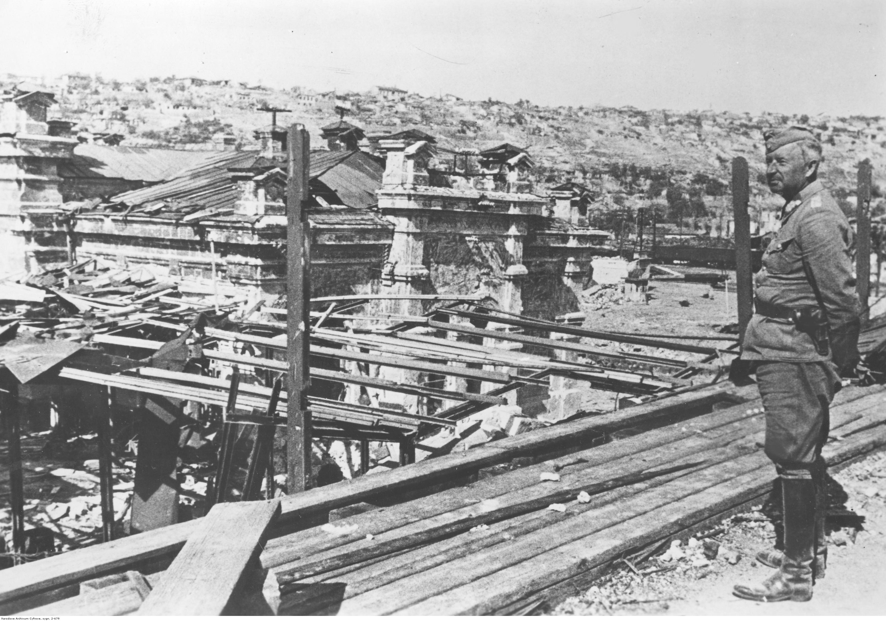 Marszałek Erich von Manstein w ruinach Sewastopolu.